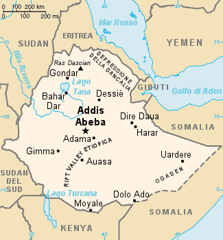 Mappa dell'Etiopia (tratta dal "CIA World Factbook")